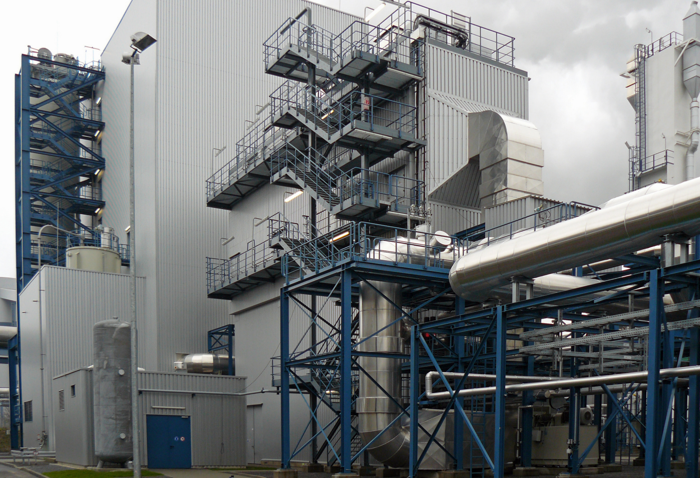 CO2-emissionsarmes Kraftwerk Schwarze Pumpe, im Hintergrund das Kesselhaus, in der Bildmitte die E-Filter Anlage.